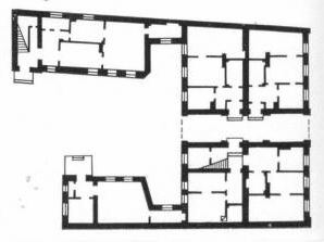 Брэст. План дома па вуліцы Карла Маркса, 53